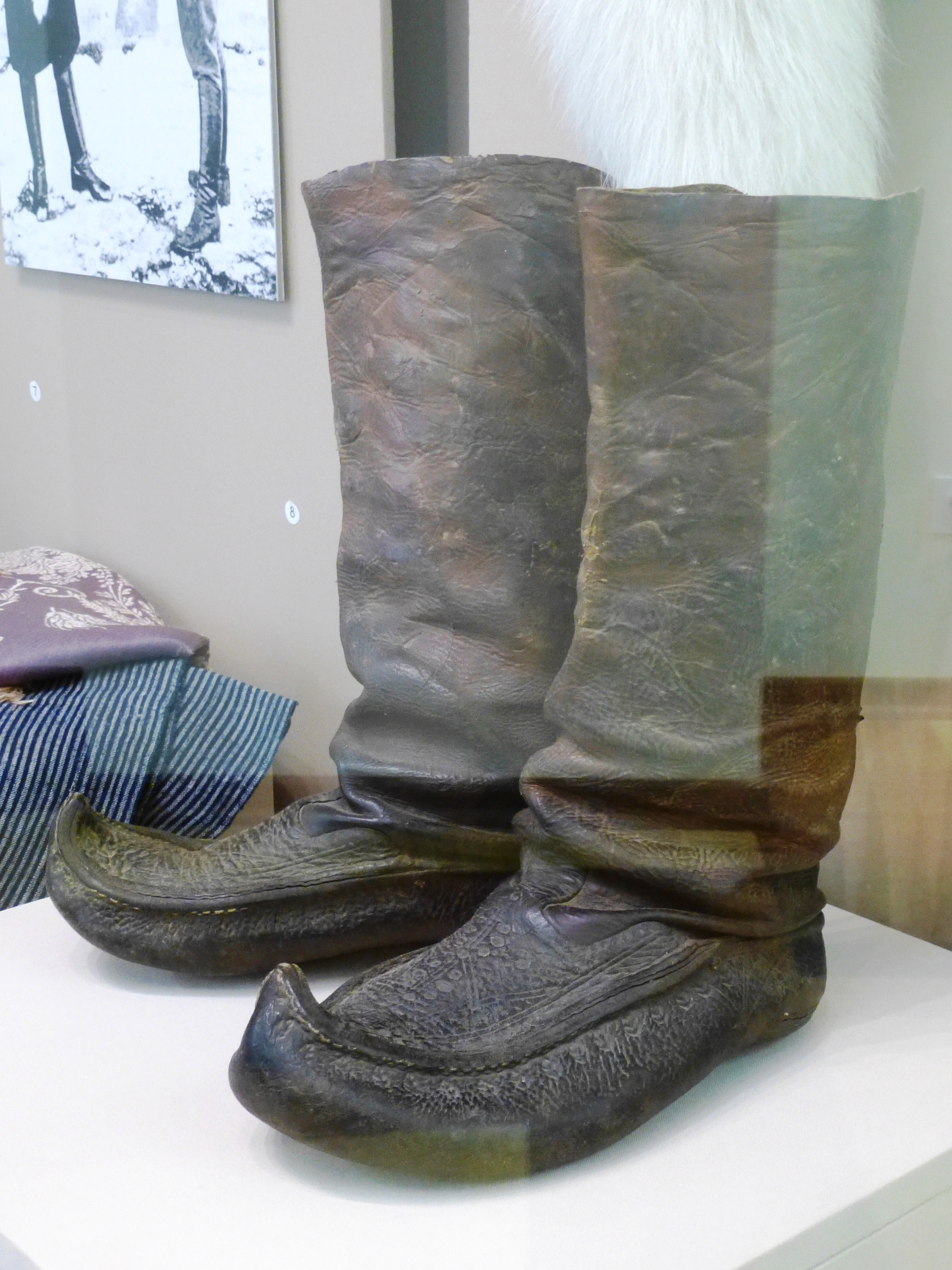 Мужские кожанные сапоги-кёньги зажиточного карела Олонецкой губернии. Национальный музей Петрозаводска.